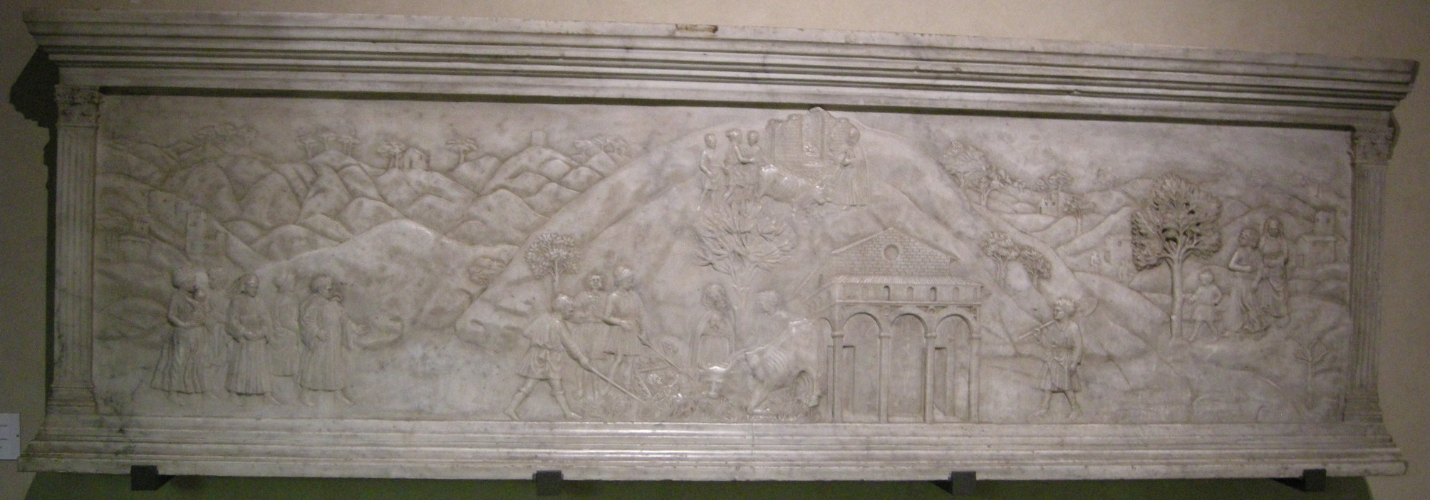 Scultore fiorentino della metà del XV sec., dossale dell'altare della vergine